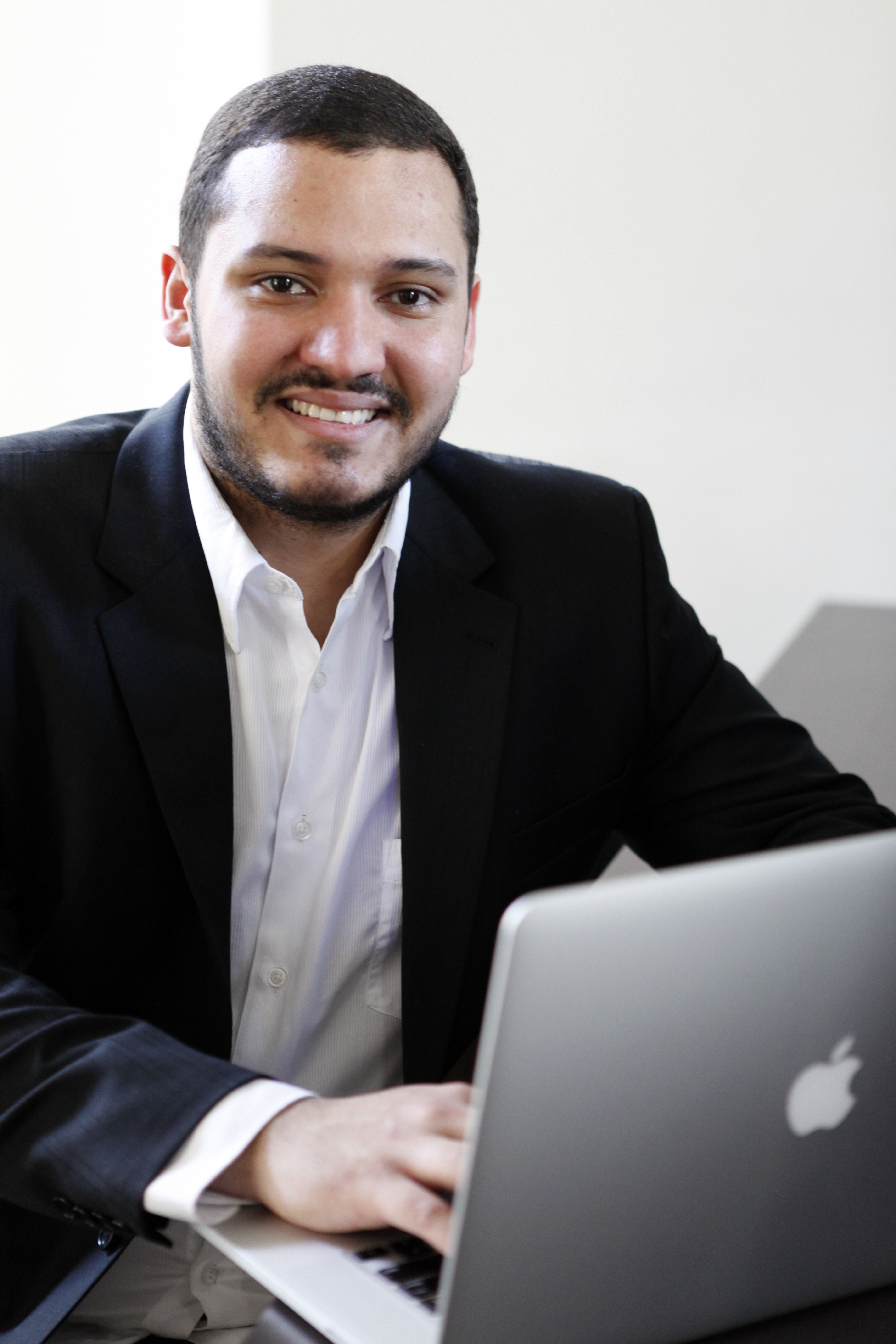 Diogo Pascoal, co-fundador da Kickante, plataforma de crowdfunding.